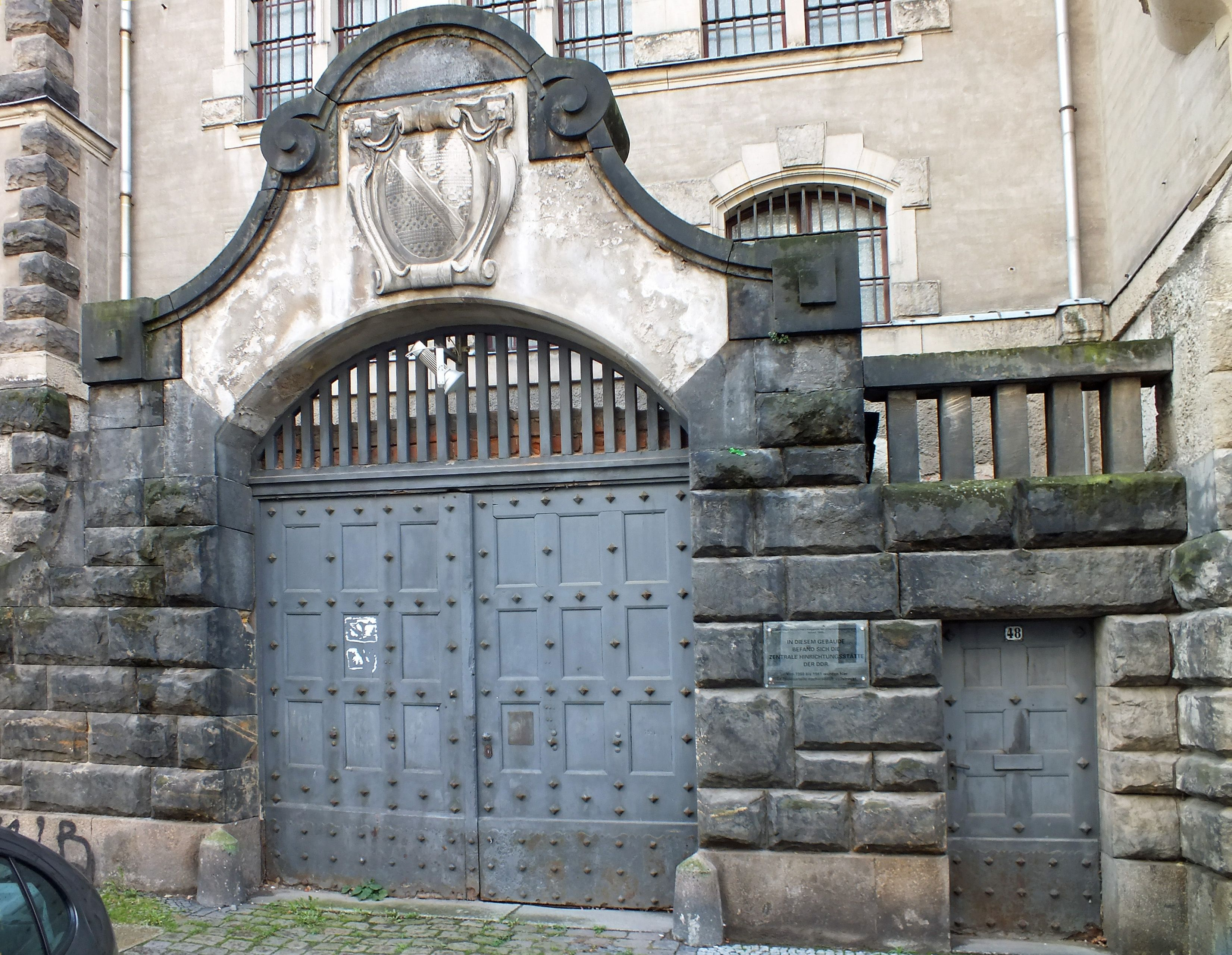 Eingang zur ehemaligen zentralen Hinrichtungsstätte der DDR, Seitenflügel des heutigen Amtsgerichts Leipzig.